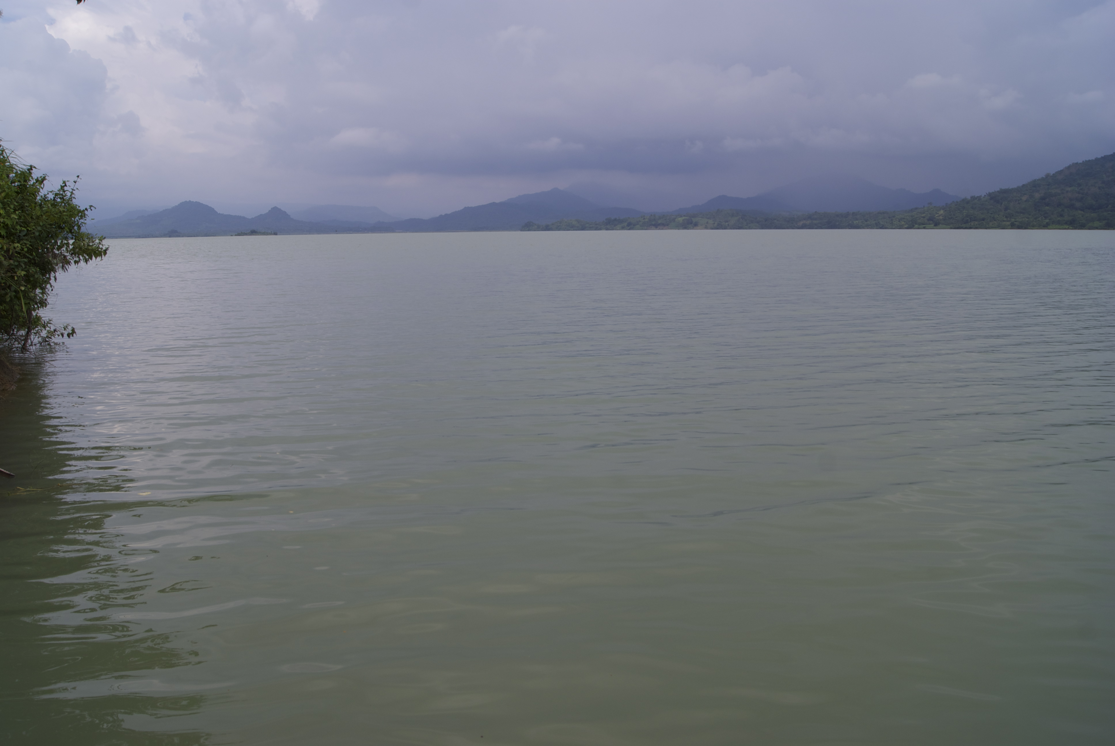 Bendungan Bilibili, Sulawesi Selatan